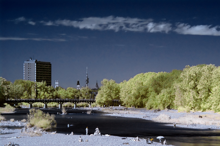 Falschfarbenaufnahme des Isarufers im Münchner Süden